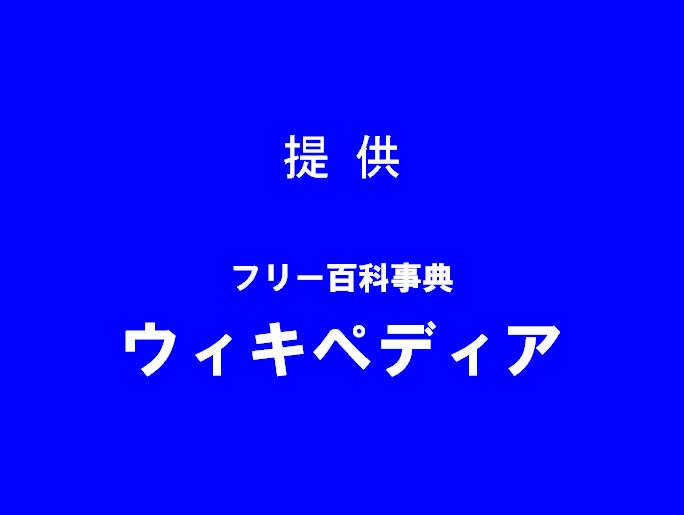 提供クレジット表示例（比率4:3、ブルーバック）